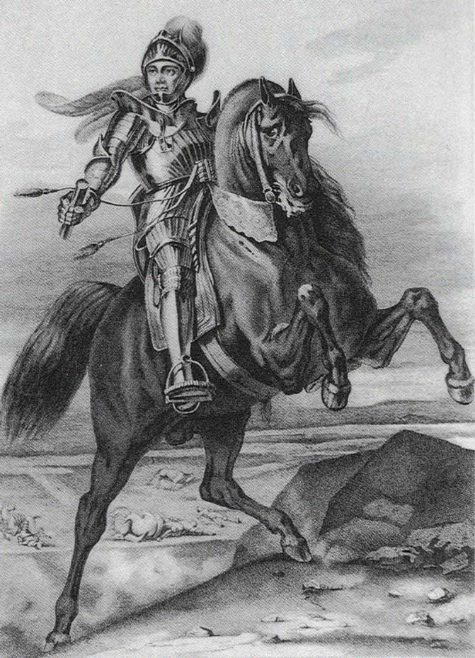 Le maréchal Jacques II de Chabannes de La Palice (1470-1525).